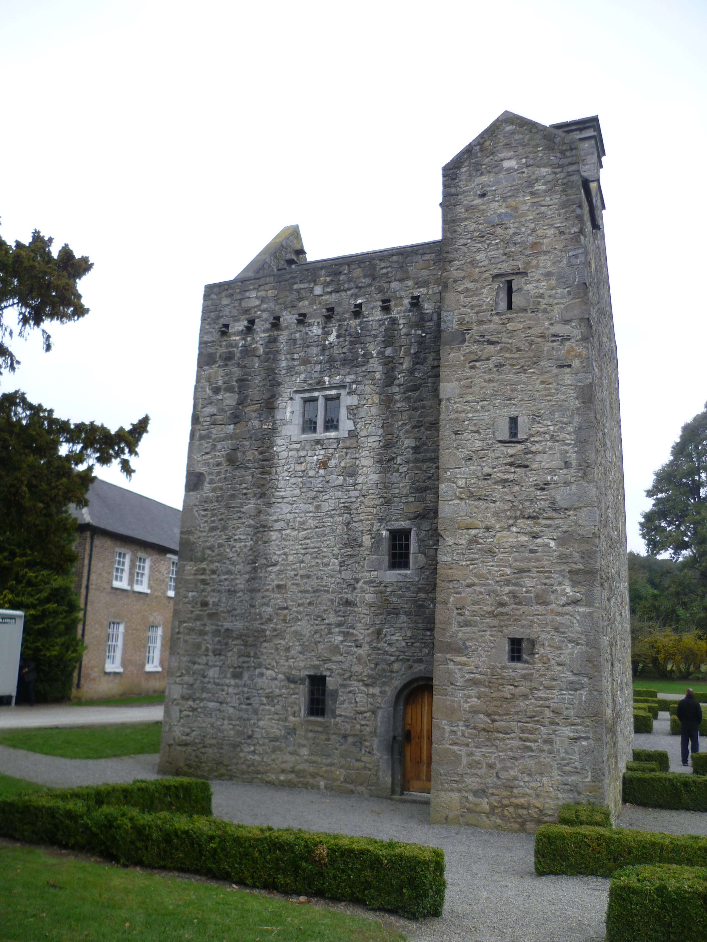 Ashtown Castle, im phoenix Park in Dublin, Irland